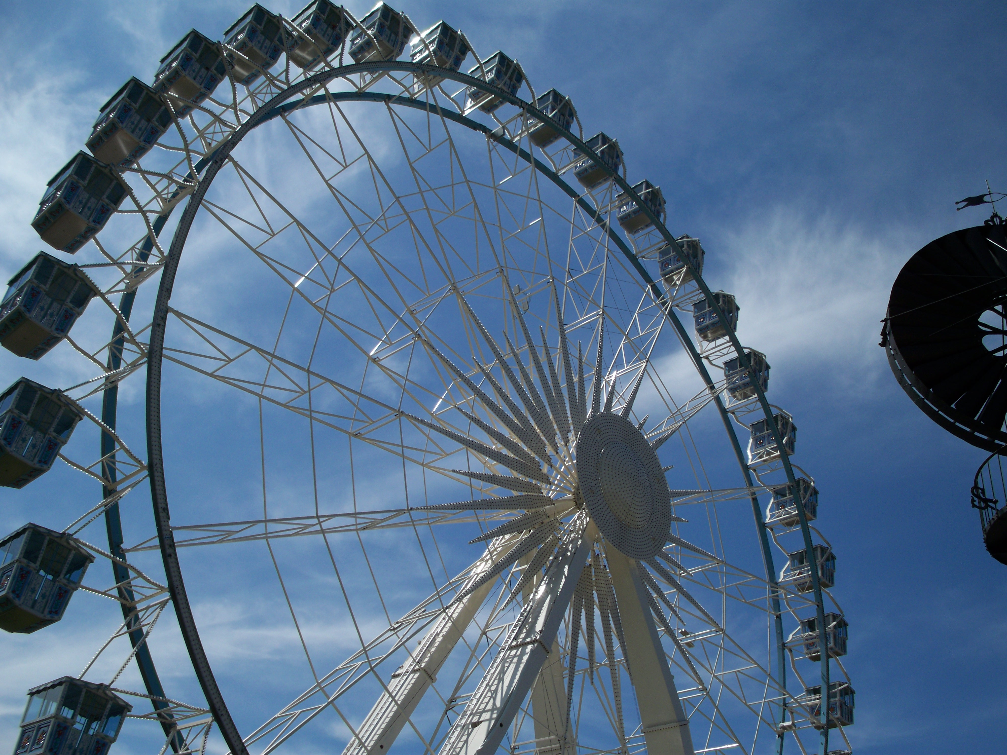 Attraction du parc Nigloland à Dolancourt dans l'Aube.